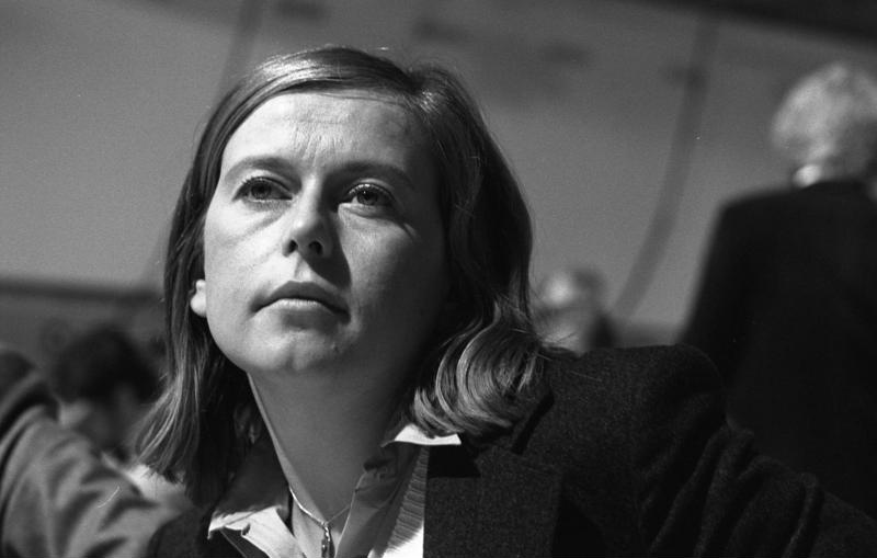 29. Bundesparteitag der F.D.P. in der Rheingold-Halle in Mainz